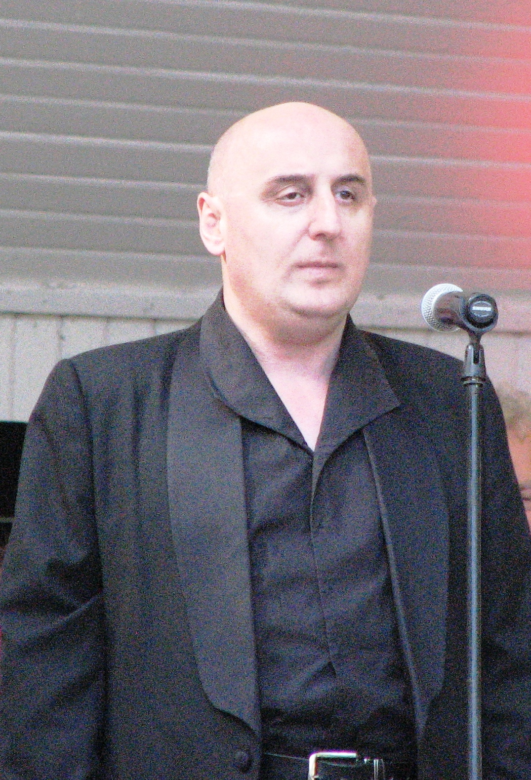 Sulkhan Gvelesiani esinemas Saaremaa Ooperipäevade avakontserdil "Kuressaare 450"